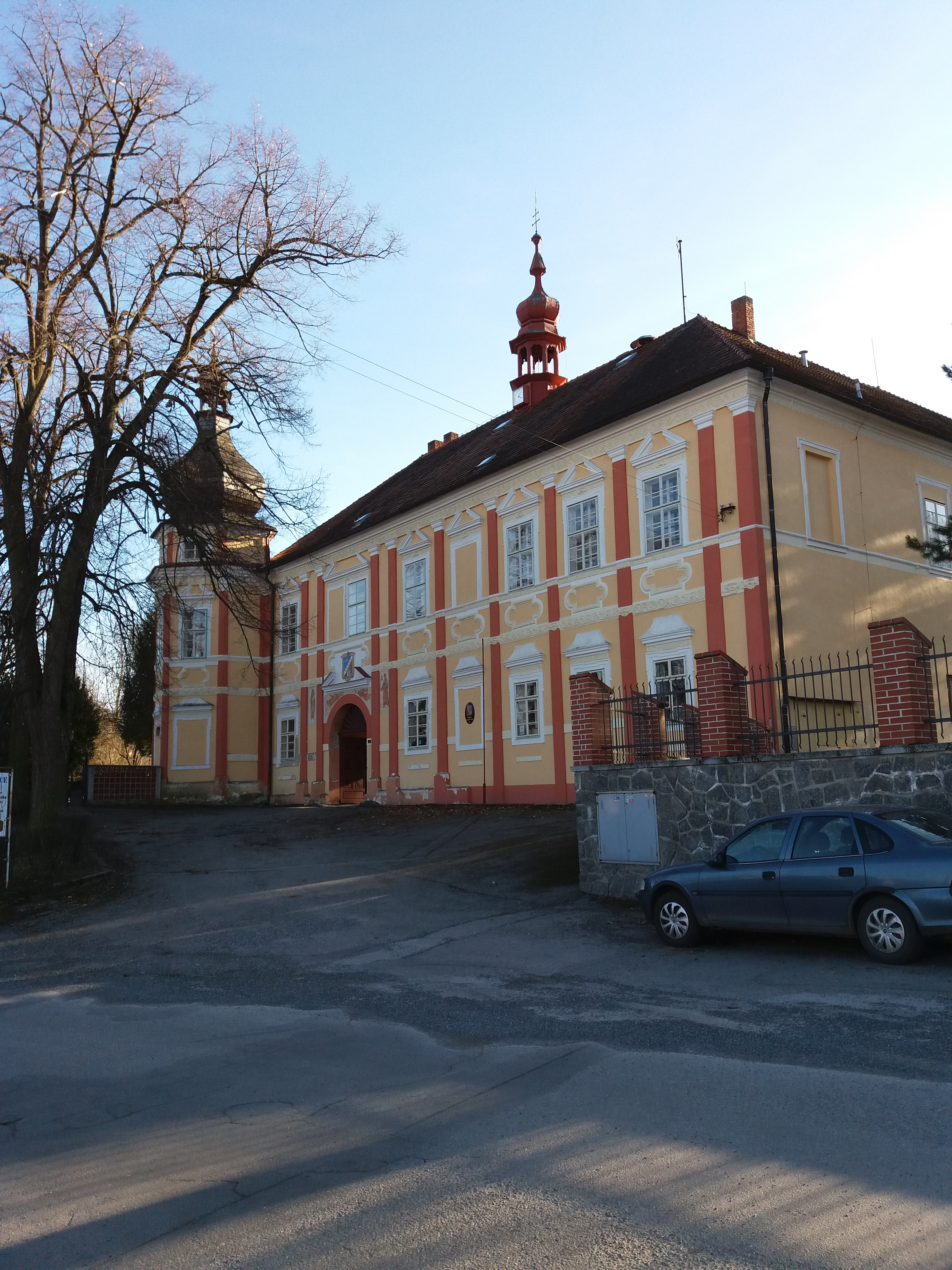 Zámek Čestice, pohled z jihu na průčelí zámku. Budova zámku je postavena do tvaru písmene L. Na snímku je vidět průčelí zámku, vlevo s bránou a dvě dominantní věže, březen 2019